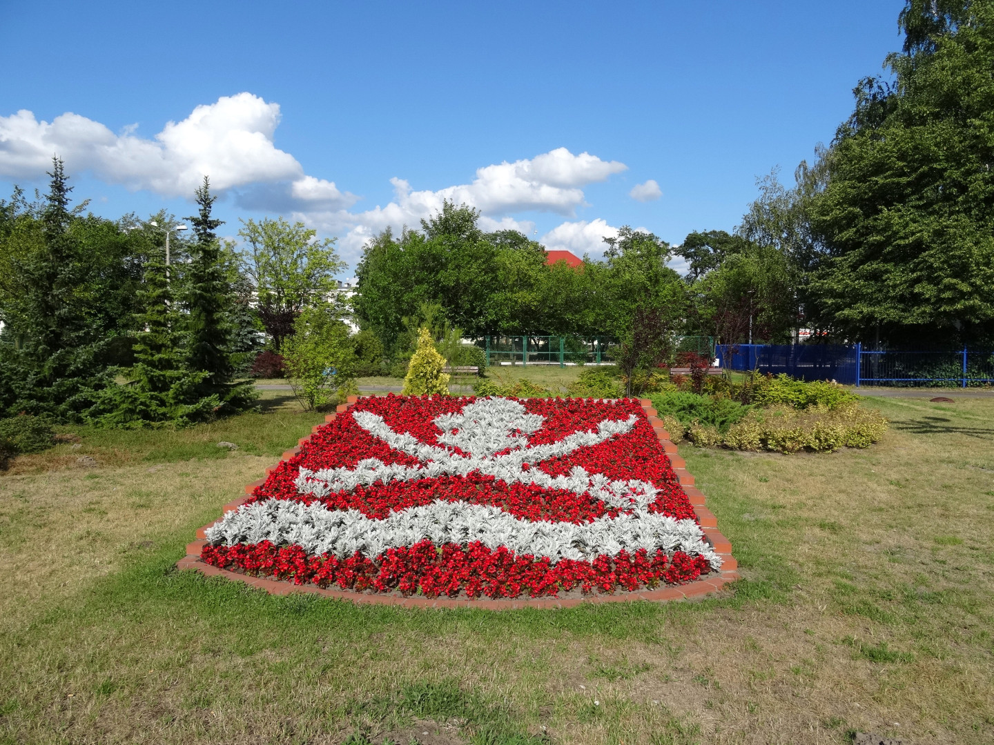 Kwiatowy herb gminy Nowa Wieś Wielka